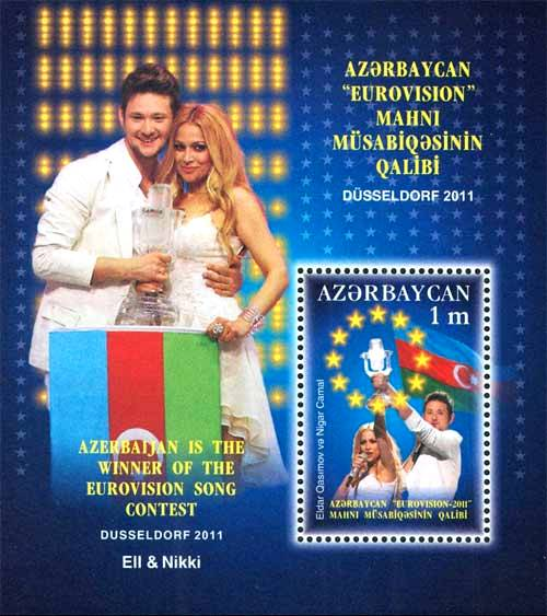 Azərbaycanın 2011 Avroviziya Mahnı Müsabiqəsindəki qələbəsinə həsr olunmuş poçt markası.